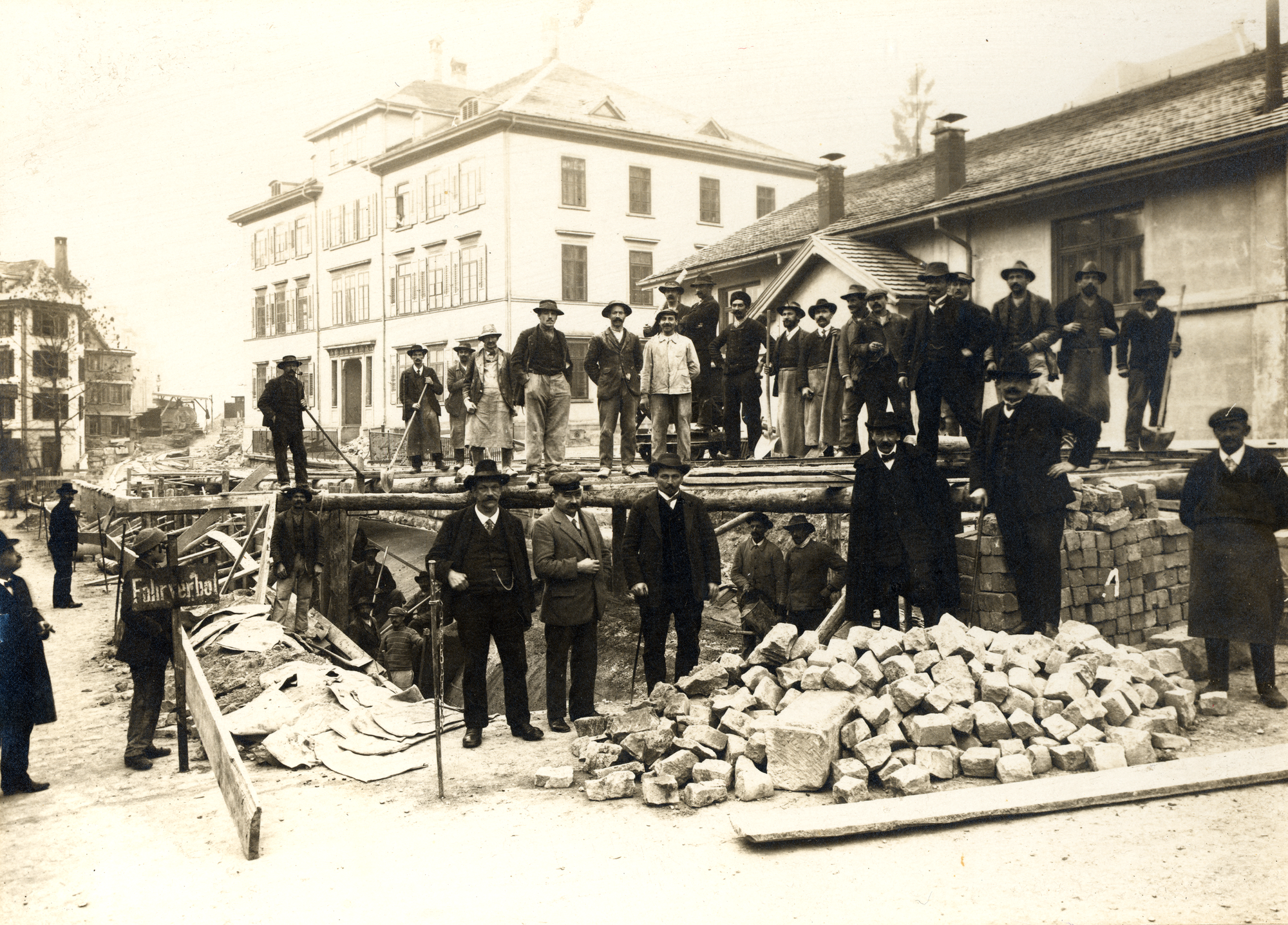 Nach 1912 wurde die Bahnstrecke St. Gallen–St. Fiden zugemauert. In der Bildmitte Schulhaus Graben, rechts Grabenhalle